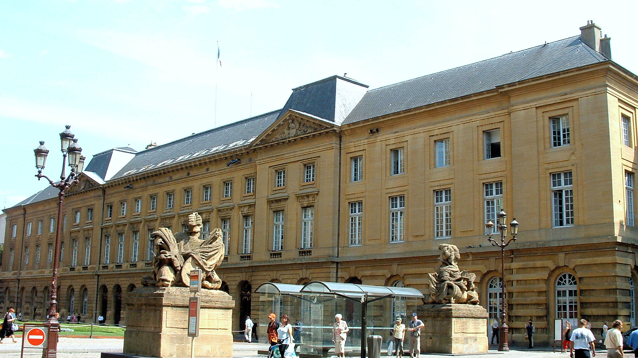 Hôtel de ville de Metz sur la place d'Armes